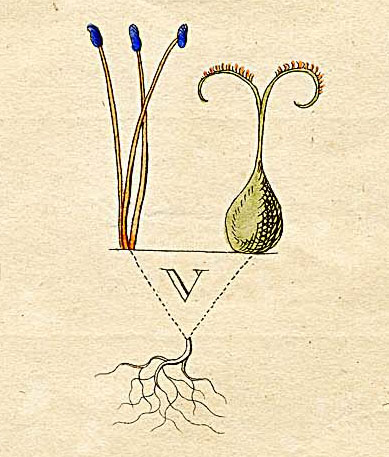 Ausschnitt (Klasse XXI) aus Ehrets Tafel "Methodus Plantarum Sexualis"